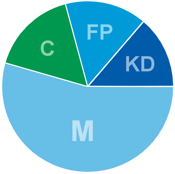 Graphique représentant les rapports de force au sein de la coalition "Alliance pour la Suède", formant l'actuelle majorité parlementaire suédoise.